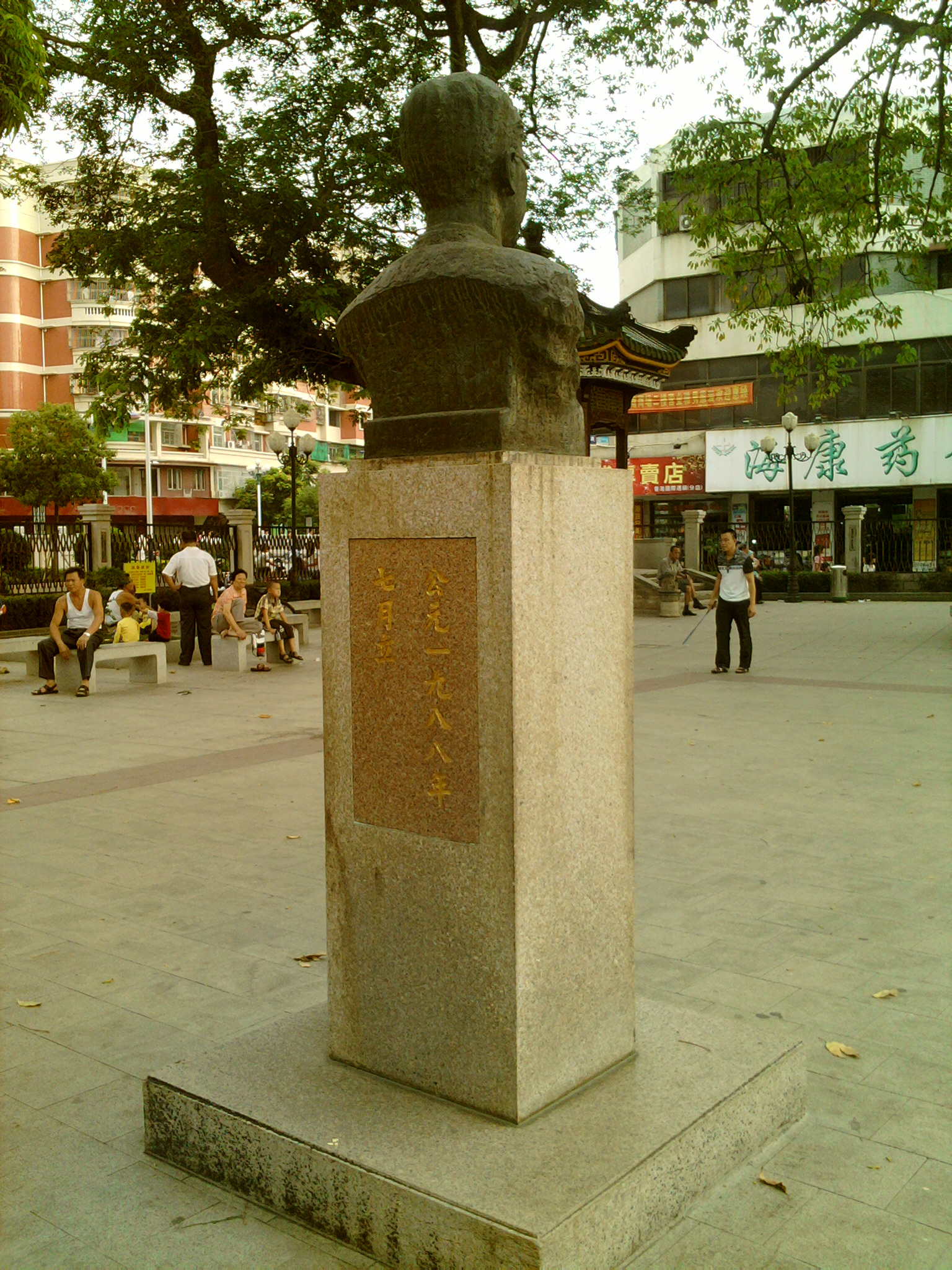 公元一九八八年七月立